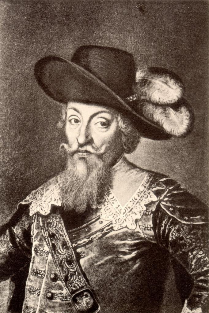 Česky: Jan Jiří z Arnimu, saský polní maršál